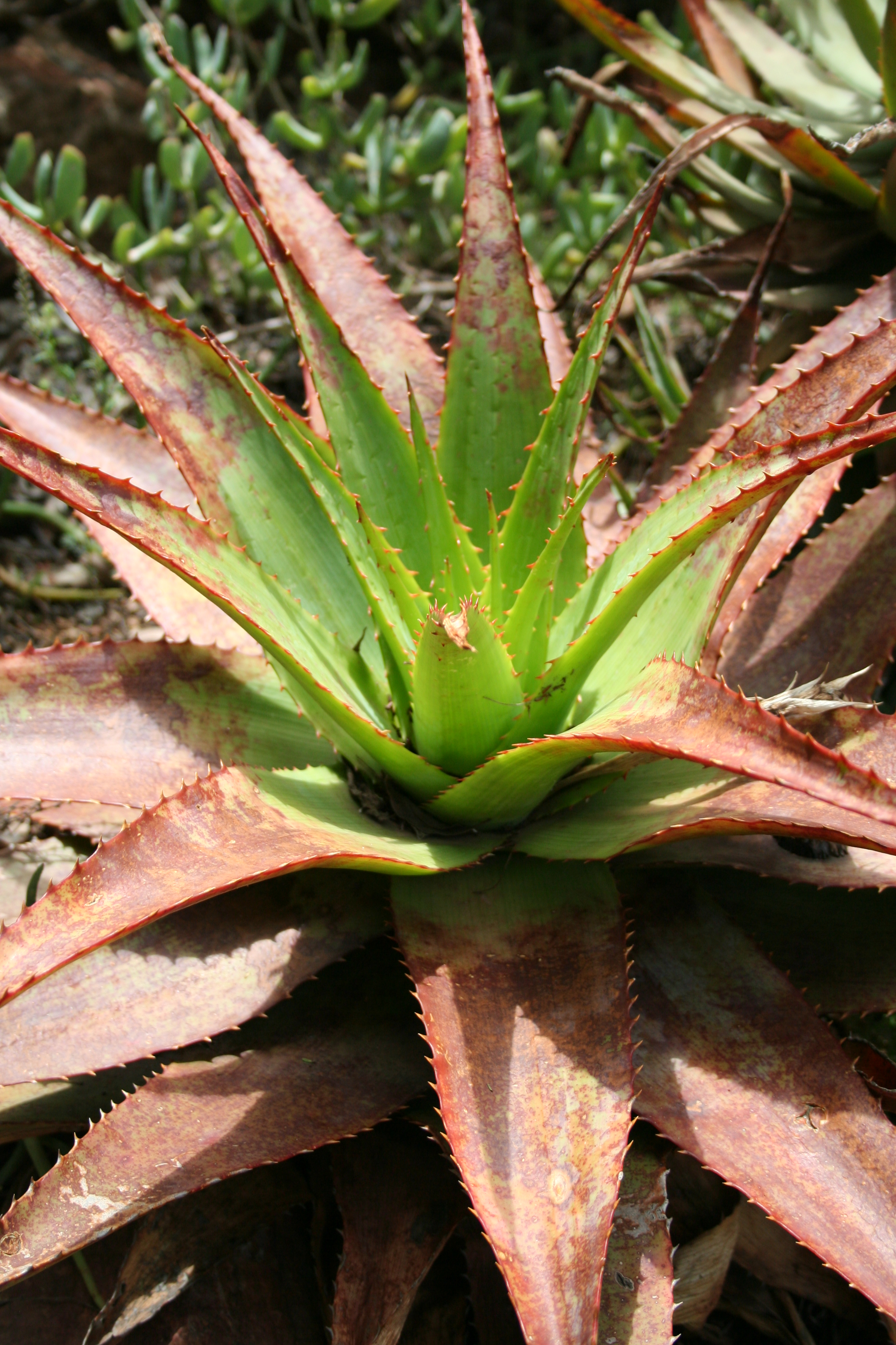 Aloe succotrina, W.Sisulu Bot. Garden